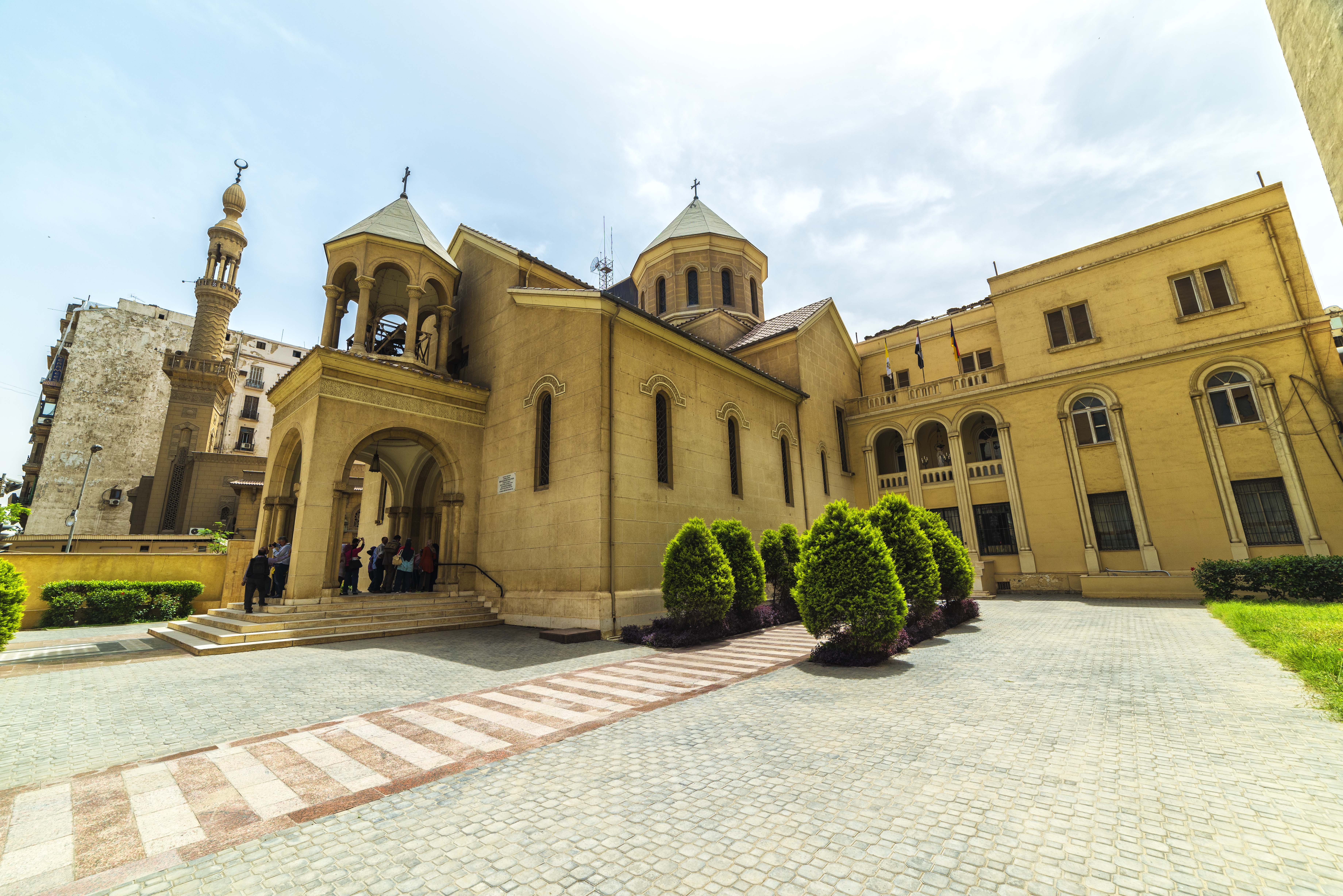 Arménská katedrála Zvěstování v Káhiře, Egypt